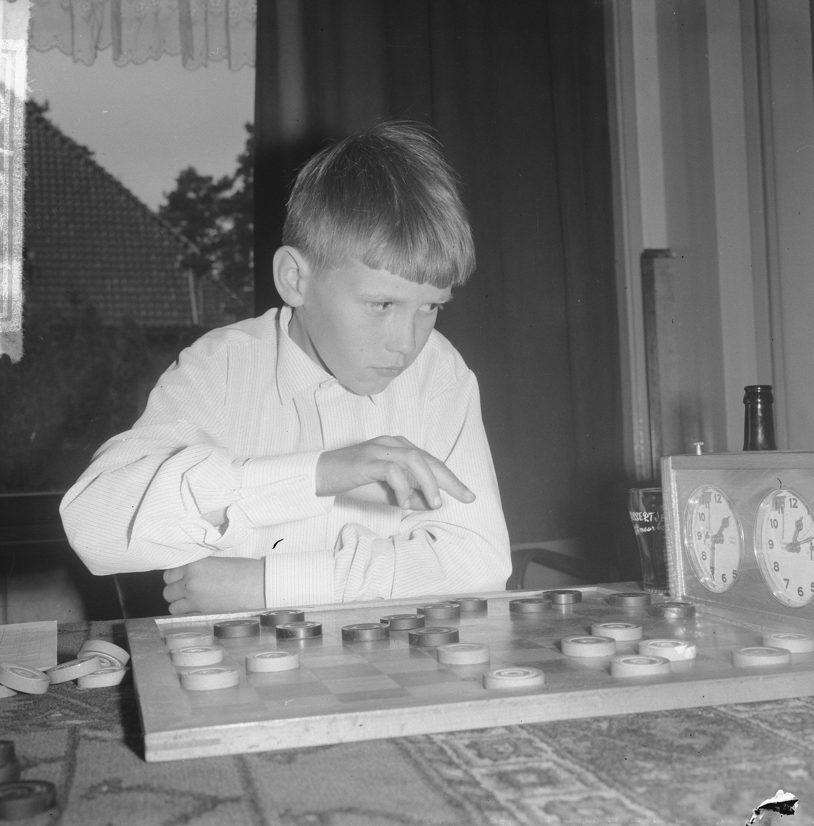 Collectie / Archief : Fotocollectie Anefo Reportage / Serie : [ onbekend ] Beschrijving : Persoonlijk damkampioenschap te Apeldoorn, de elfjarige kampioen van Friesland, Frank Drost aan zet Datum : 20 april 1965 Locatie : Apeldoorn, Gelderland Trefwoorden : KAMPIOENSCHAPPEN, dammen, kampioenen Persoonsnaam : frank drost Fotograaf : Nijs, Jac. de / Anefo Auteursrechthebbende : Nationaal Archief Materiaalsoort : Negatief (zwart/wit) Nummer archiefinventaris : bekijk toegang 2.24.01.03 Bestanddeelnummer : 917-6678